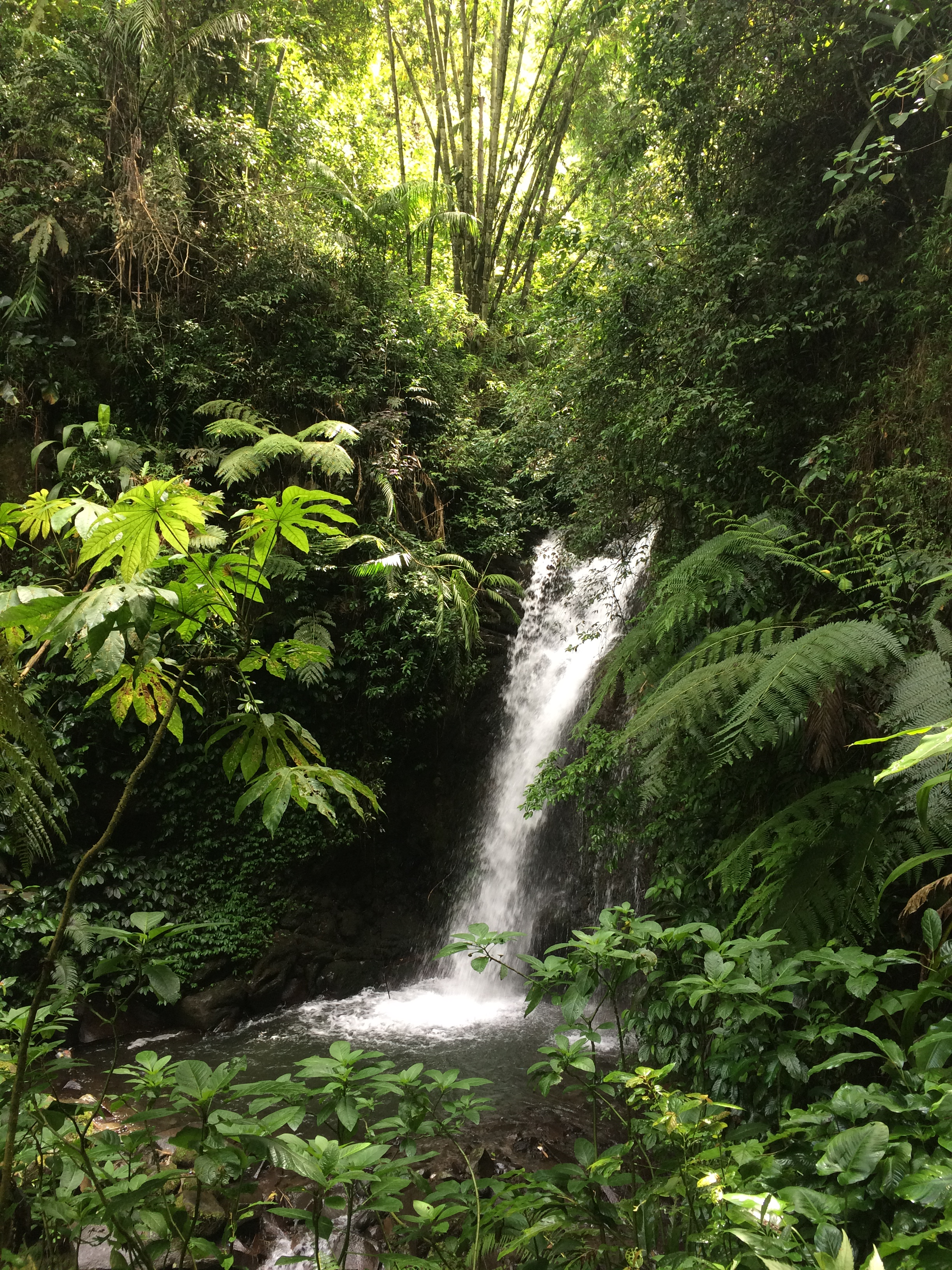 Curug Santang, Desa Argamukti, Kecamatan Argapura